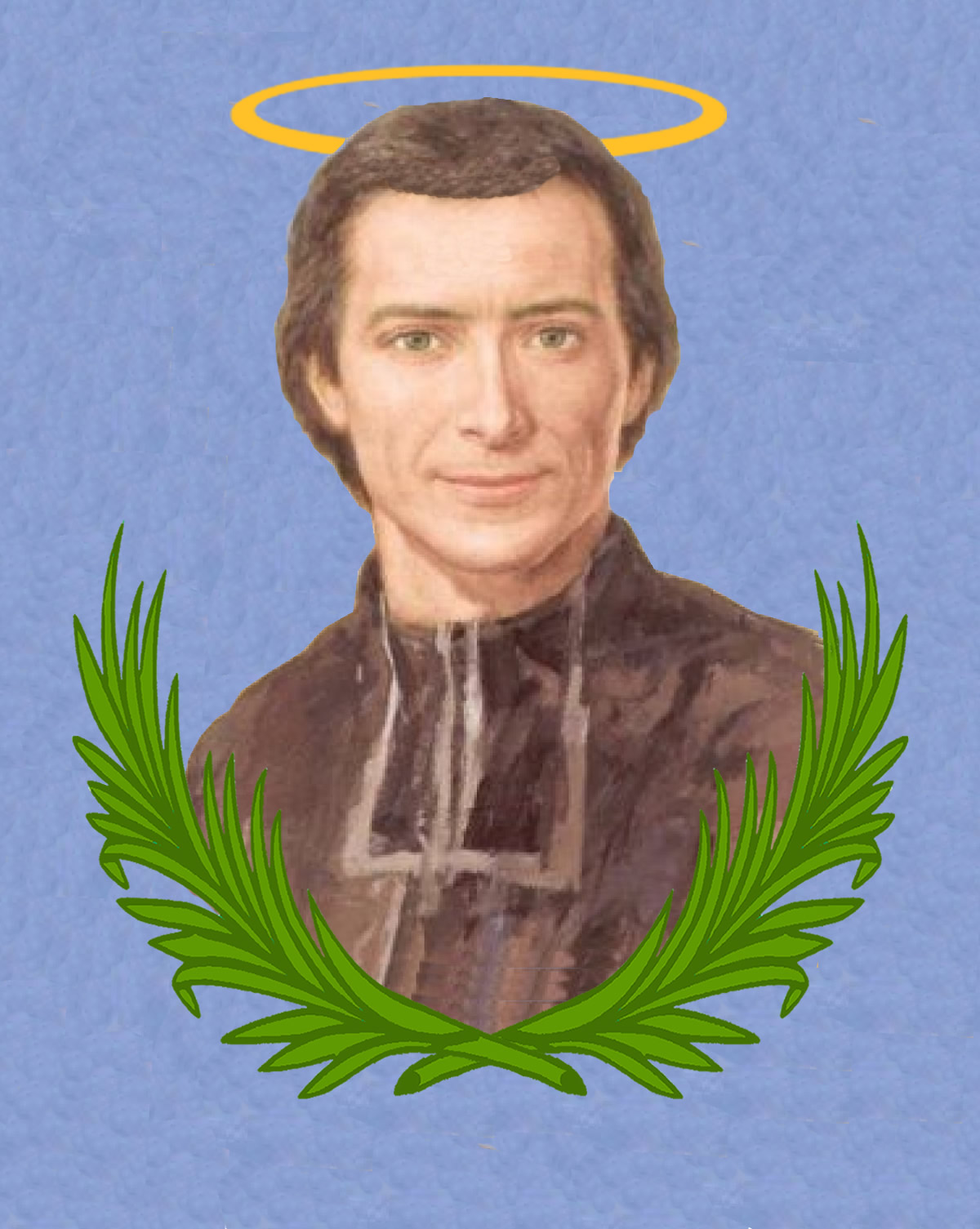 Estampa contemporanea